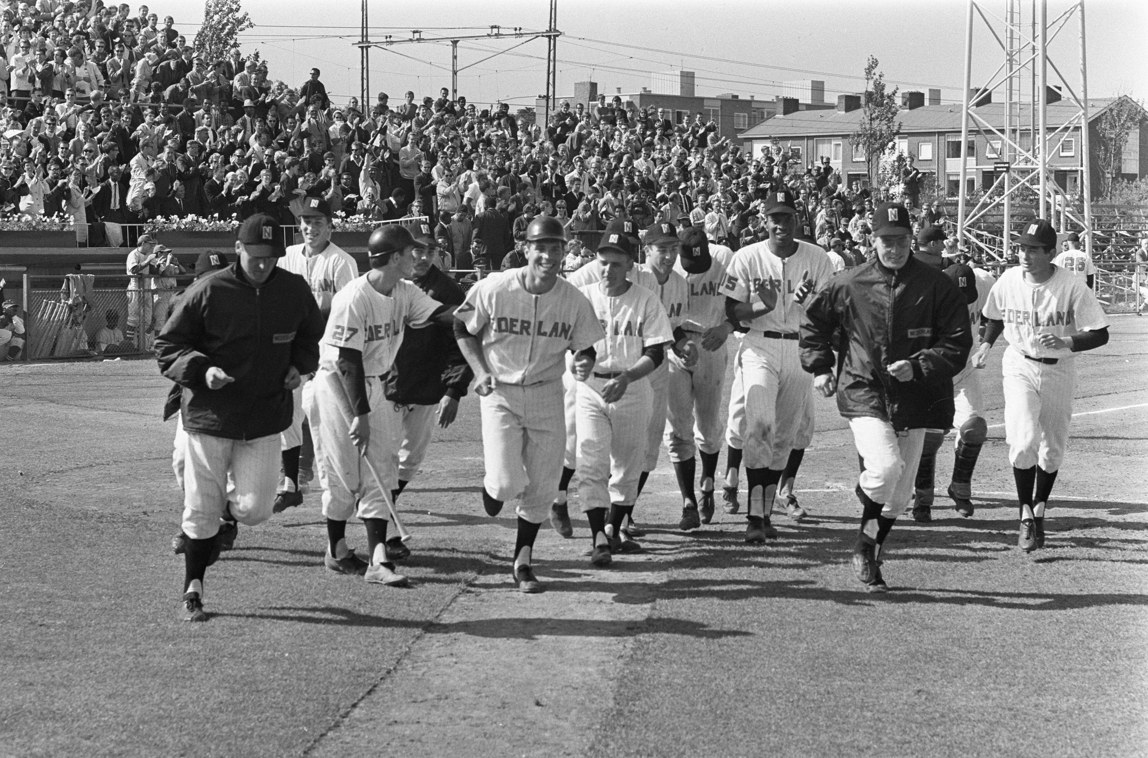 Collectie / Archief : Fotocollectie Anefo Reportage / Serie : [ onbekend ] Beschrijving : Haarlemse Honkbalweek Nederland tegen Nederlandse Antillen. Fokke Jelsma heeft een home-run gescoord, het hele team wachtte hem op Datum : 20 juli 1968 Locatie : Nederland, Nederlandse Antillen Trefwoorden : honkbal Fotograaf : Koch, Eric / Anefo Auteursrechthebbende : Nationaal Archief Materiaalsoort : Negatief (zwart/wit) Nummer archiefinventaris : bekijk toegang 2.24.01.05 Bestanddeelnummer : 921-5238